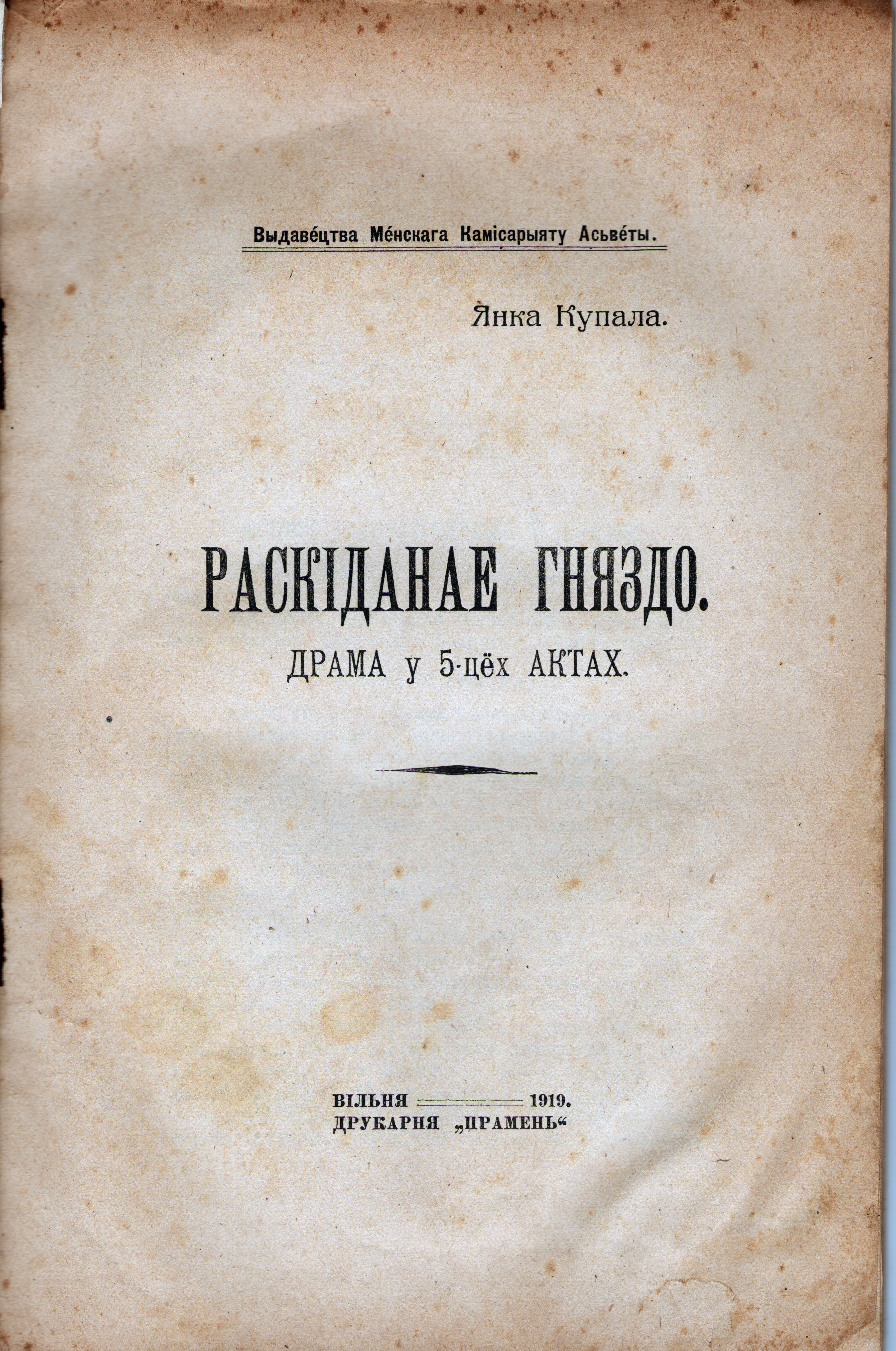 Беларуская (тарашкевіца): Раскіданае гняздо - тытульная старонка